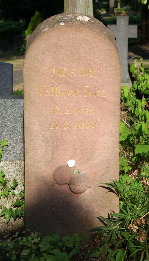 Grab des Archäologen Volkmar Fritz, 1938-2007, auf dem Hauptfriedhof Mainz